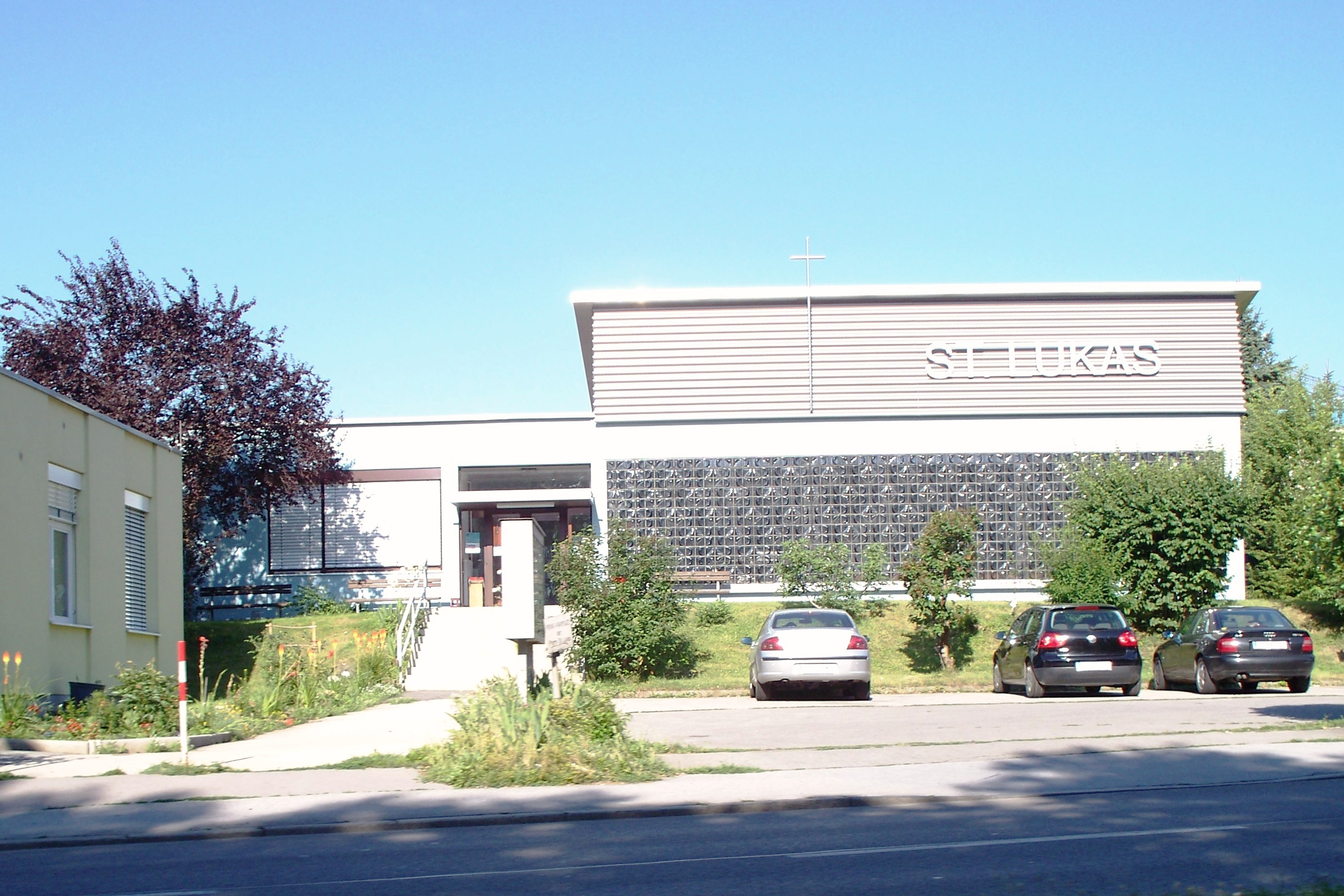 Pfarrkirche St.Lukas in Graz, Österreich